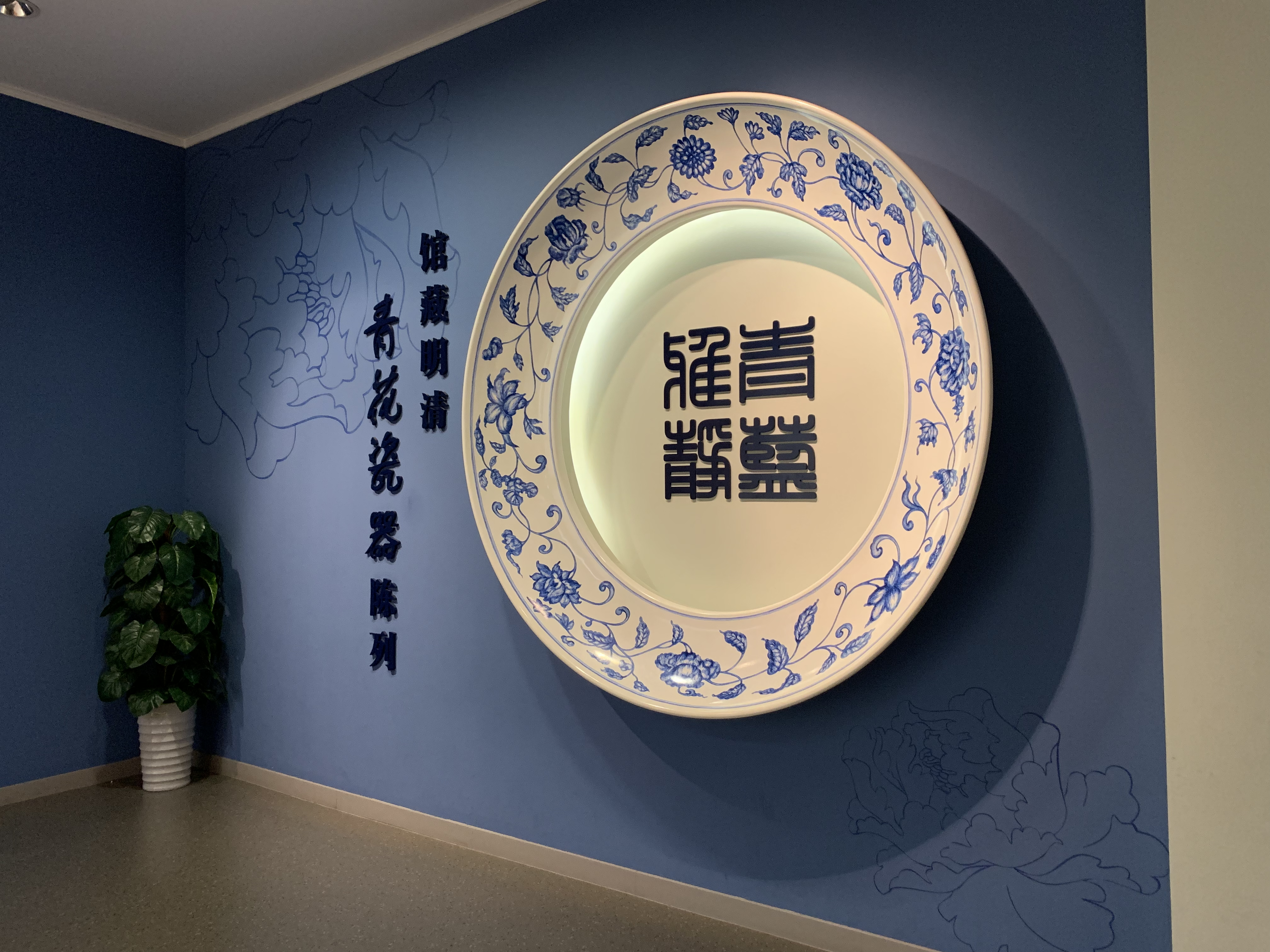 中文（中国大陆）: 天津博物馆 青蓝雅静——馆藏明清青花瓷器陈列